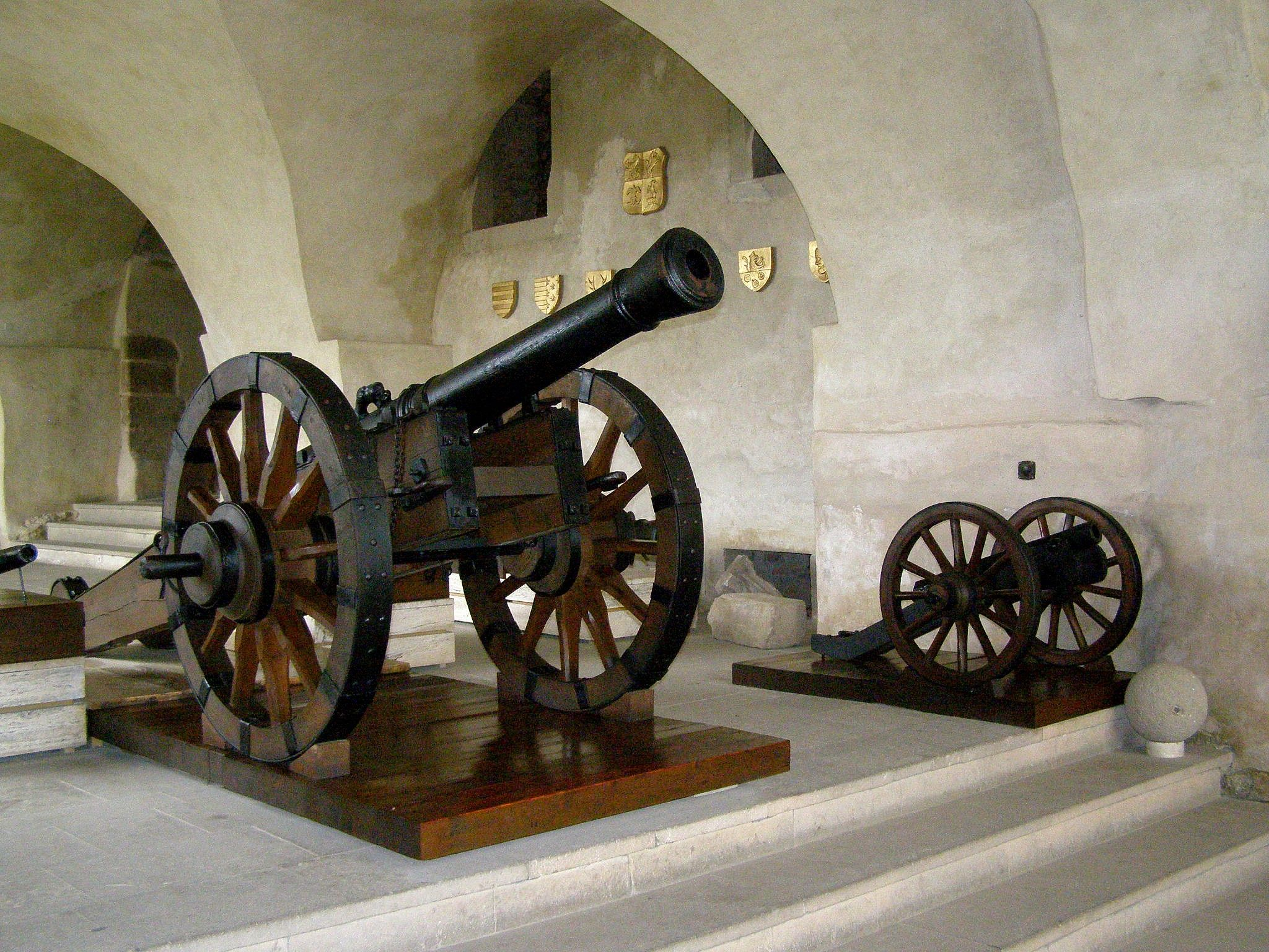 Expozícia zbraní v arkádovej chodbe